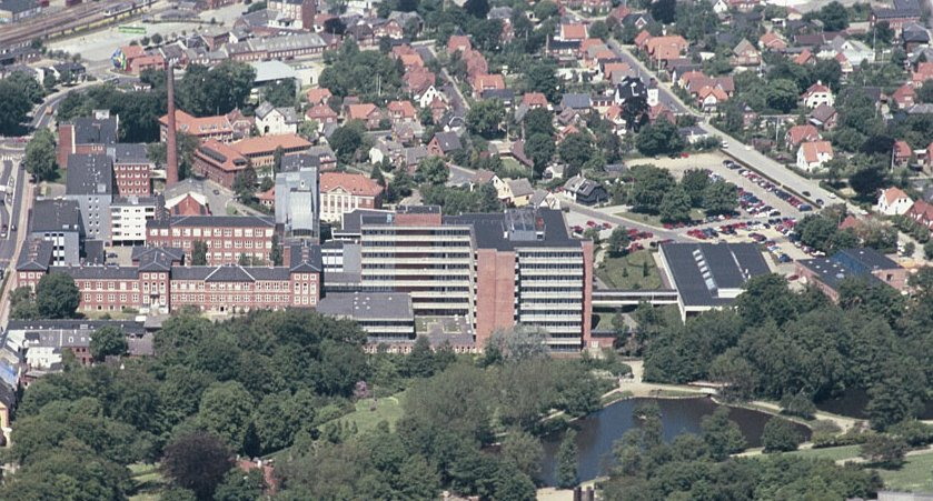 Regionshospitalet Holstebro